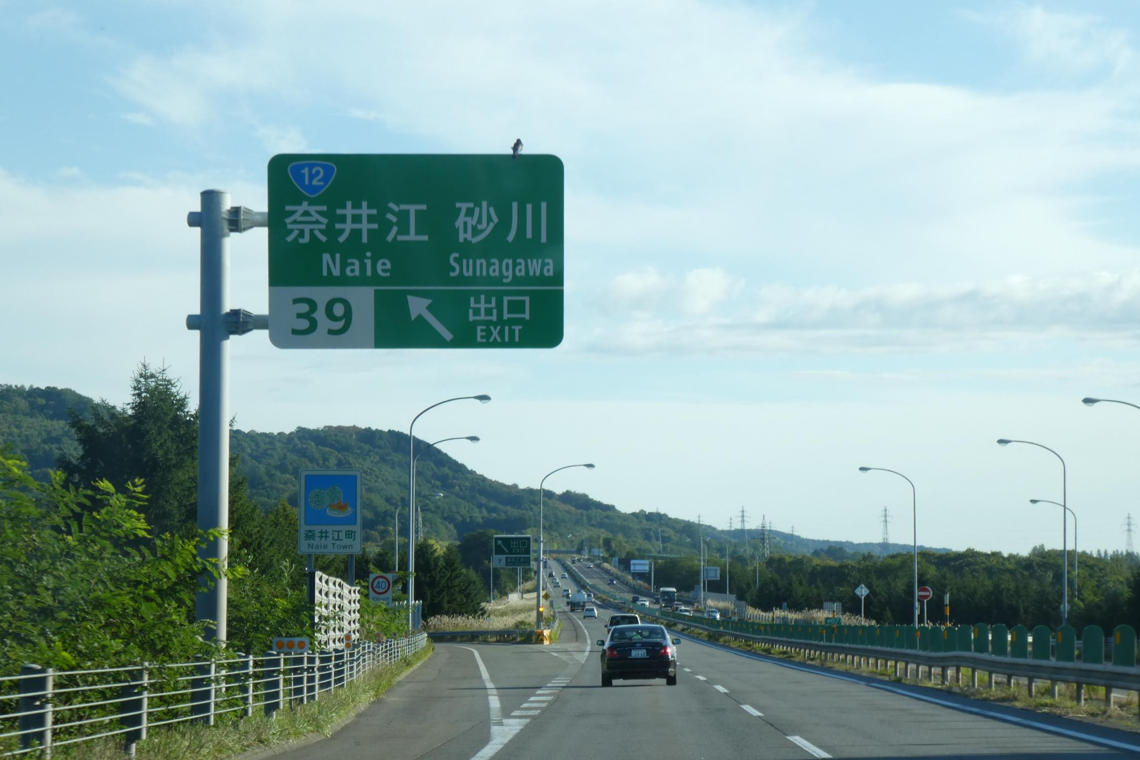 道央自動車道 奈井江砂川インターチェンジ